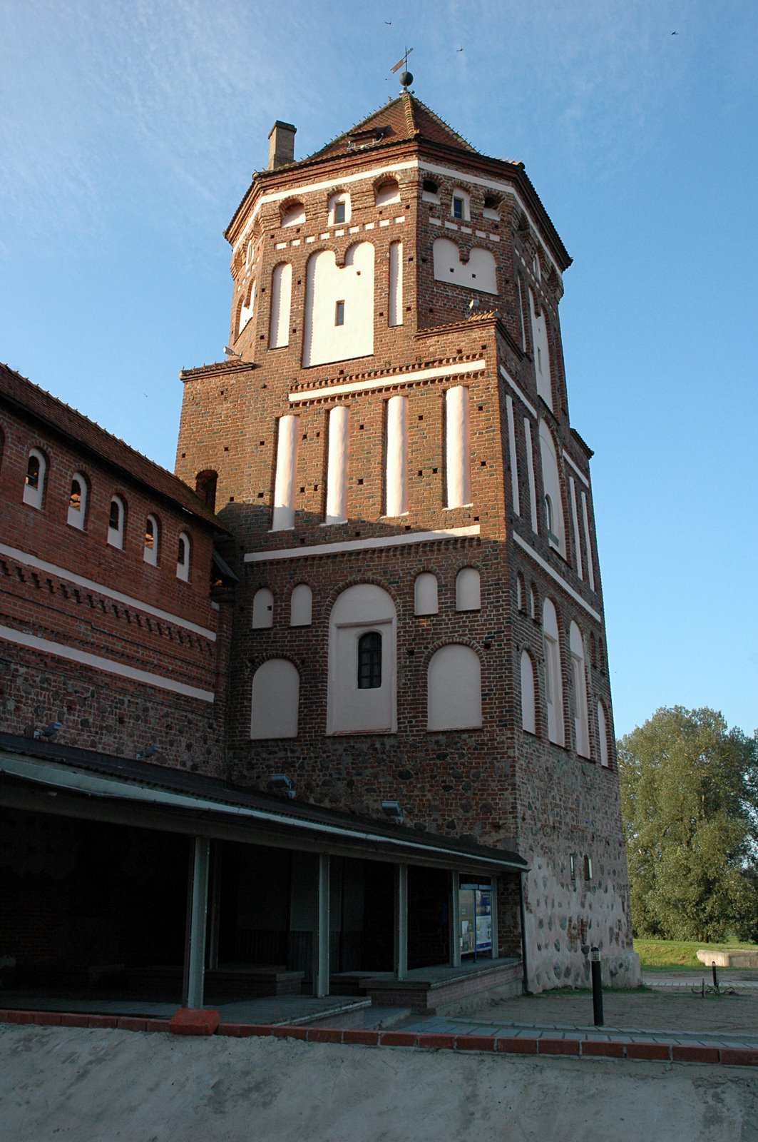 Мирский замок